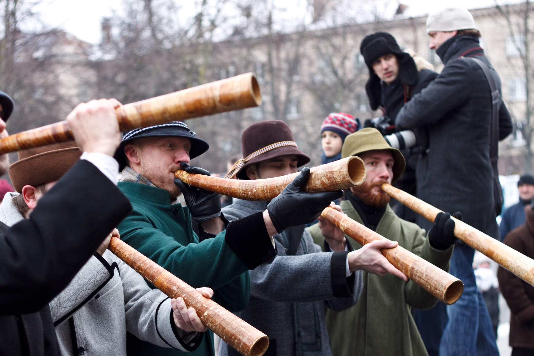 Kaziuko mugė #2